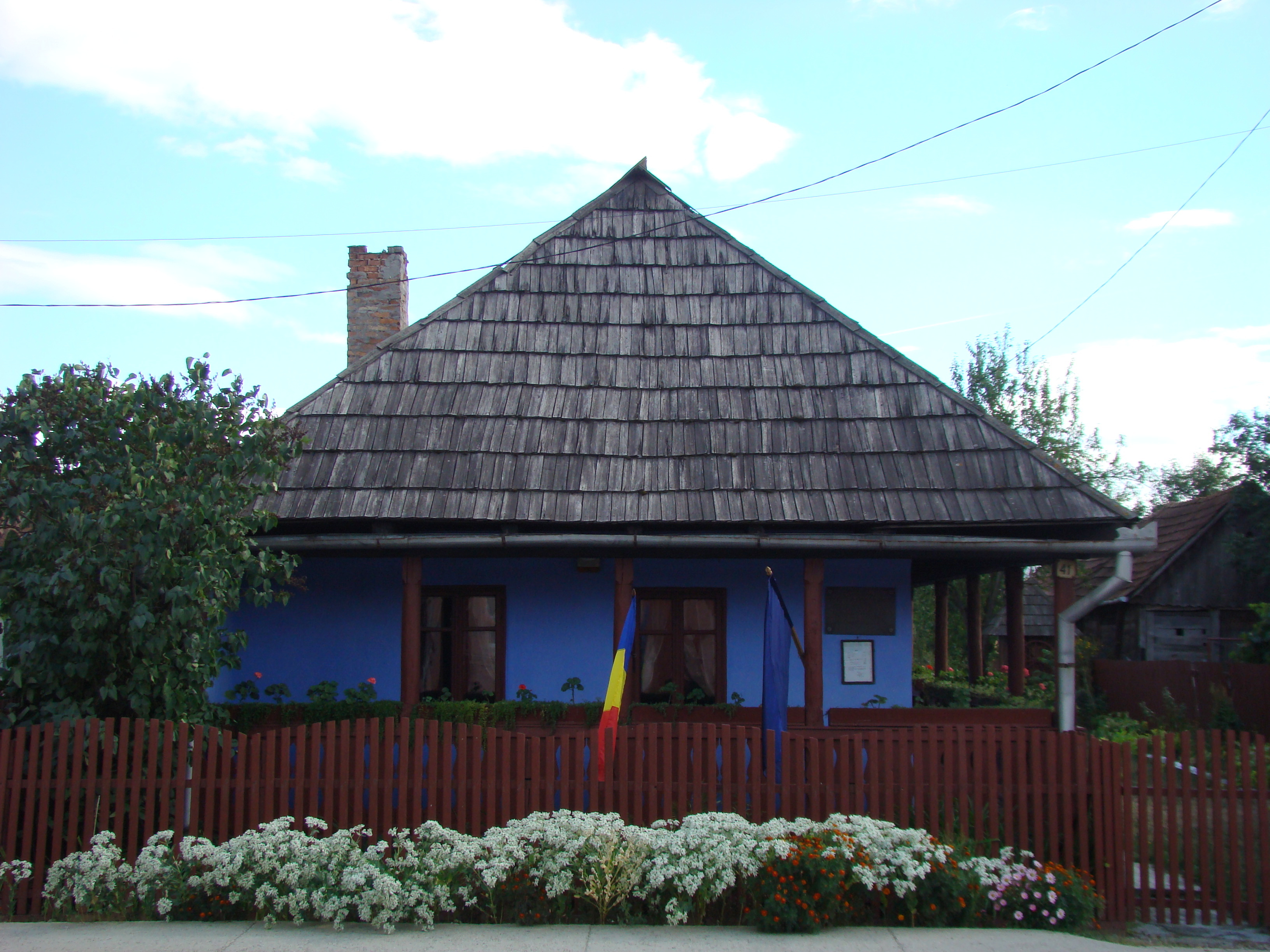 Muzeul memorial "Ion Pop Reteganul" ,sat RETEAG; comuna PETRU RAREŞ